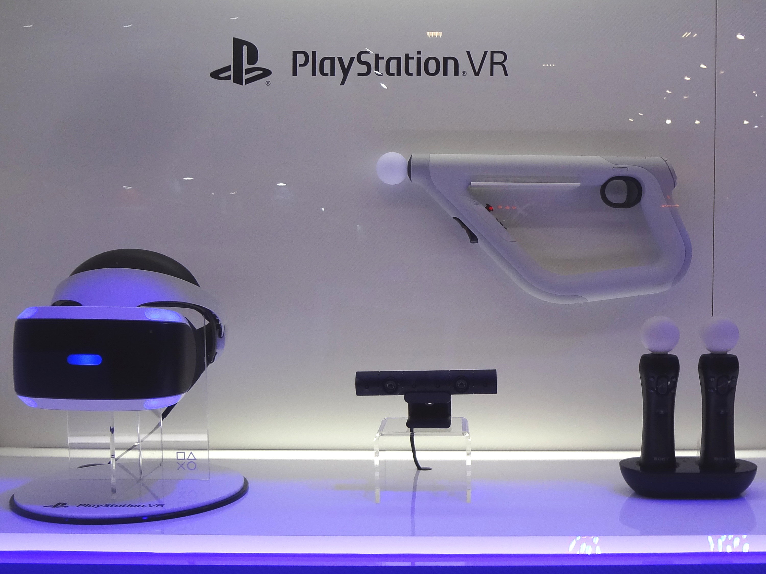 中文（台灣）: 2018台北國際電玩展，台灣索尼互動娛樂攤位，PlayStation VR展示品。